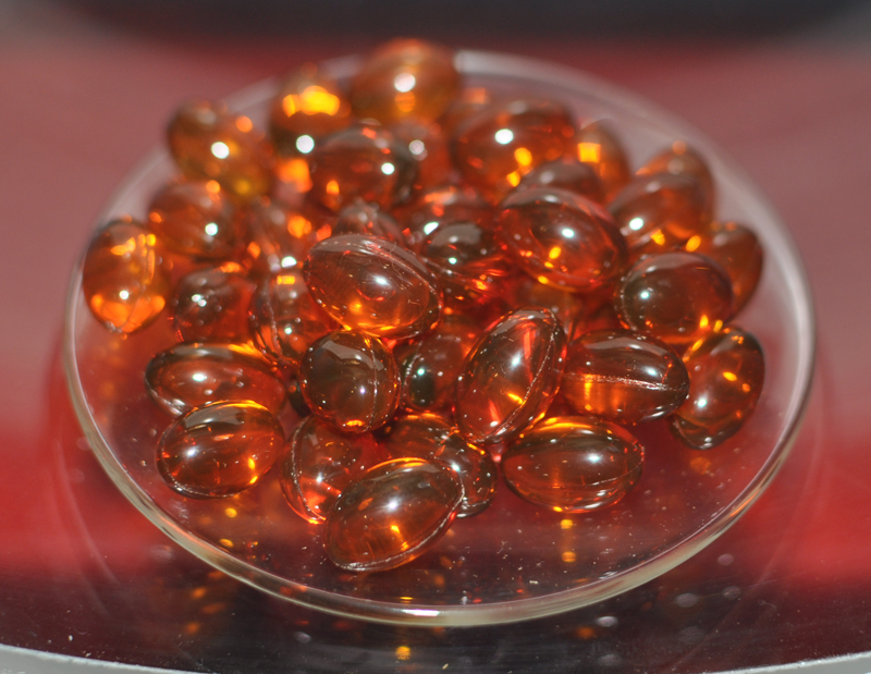 Shark liver oil Capsule Shark liver oil